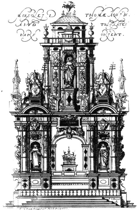 Gravure du mausolée disparu de saint Thomas d'Aquin à l'église des Jacobins de Toulouse